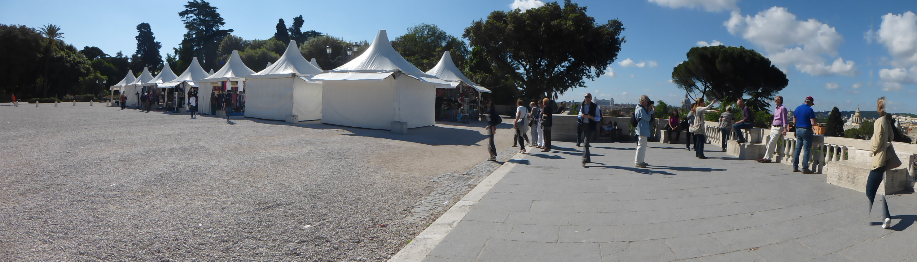 Roma, l'ambulantato si è arrampicato fino alla terrazza del Pincio, occupandola.